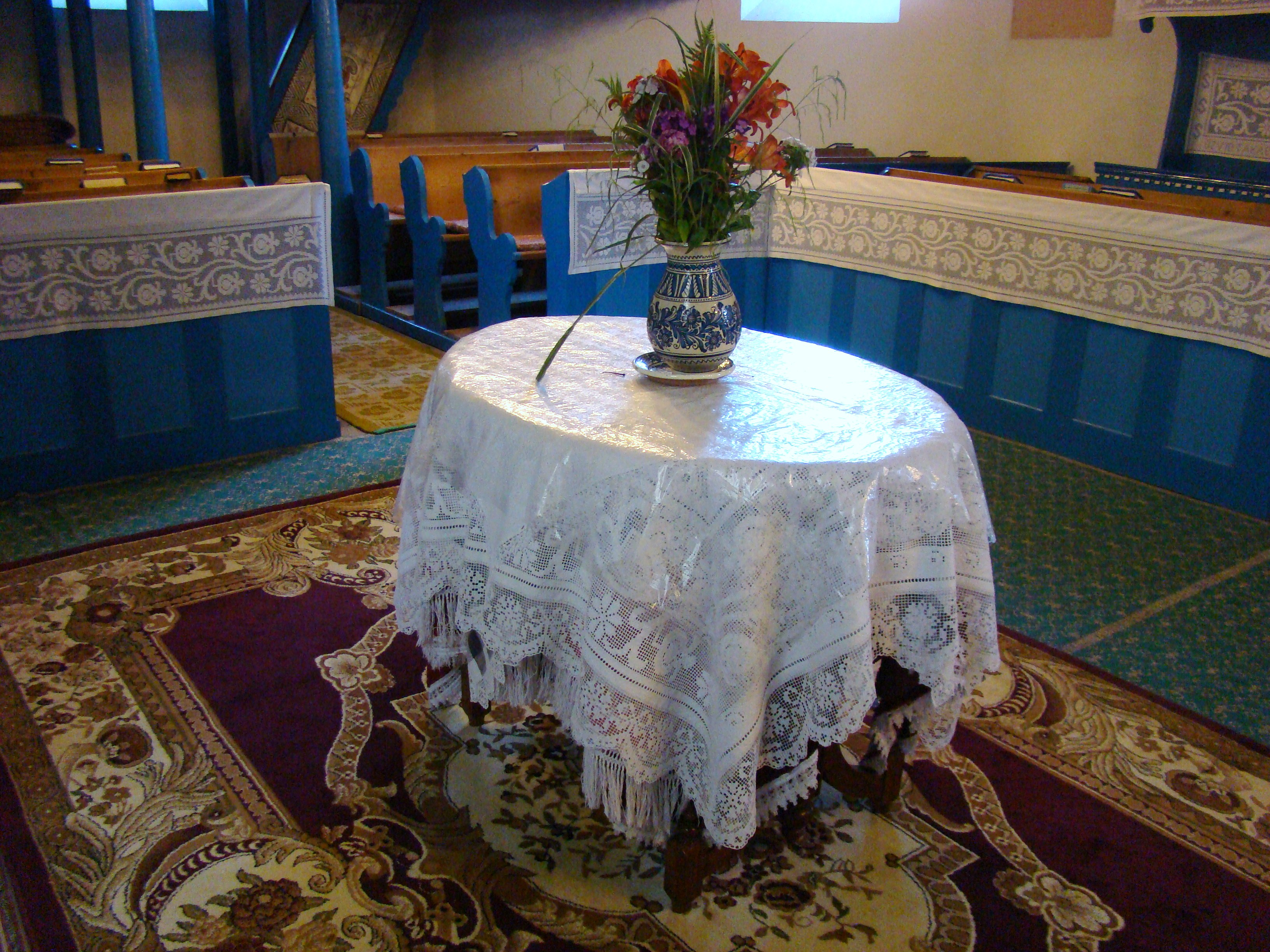 Biserica reformată, sat DUMBRAVA; comuna CĂPUŞU MARE, județul Cluj